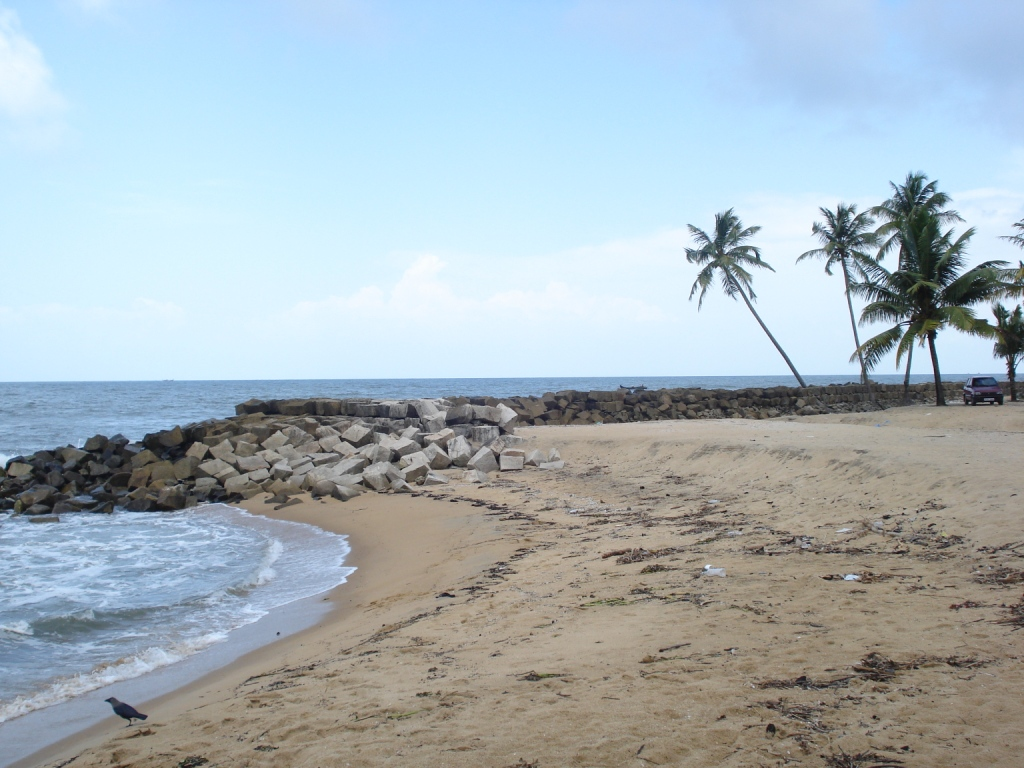 പെരിഞ്ഞനം കടപ്പുറം